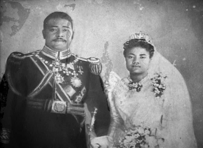 Lea faka-Tonga: Ko e taʻane ʻo Siaosi Tupou II mo Lavinia Veiongo.